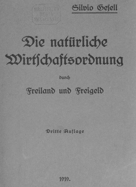 Titelseite der dritten Auflage der natürlichen Wirtschaftsordnung Silvio Gesells